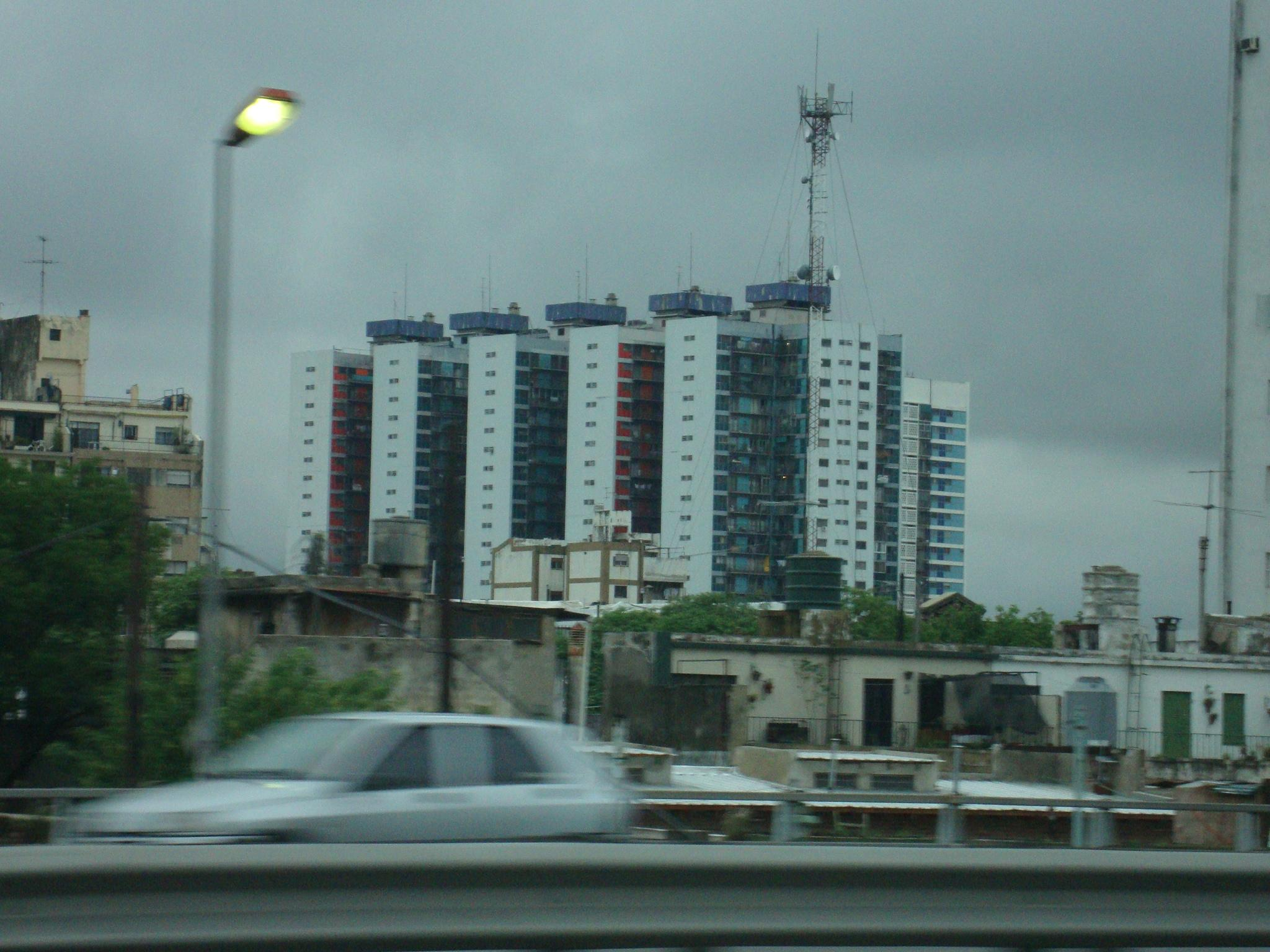 El conjunto habitacional de Brasil y Matheu, en el barrio de Parque Patricios, Buenos Aires, Argentina. Visto desde la Autopista 25 de Mayo (AU1).